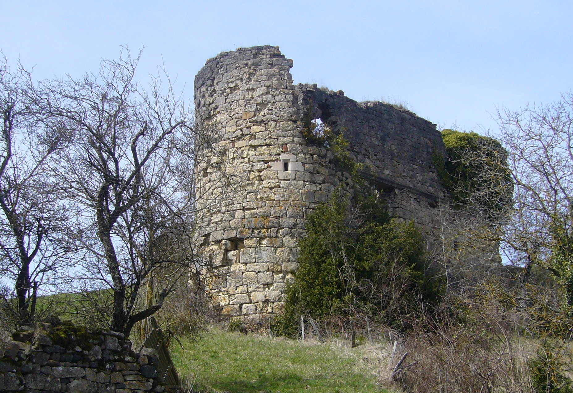 Le château des comtors de Montferrand, commune de Banassac, Lozère